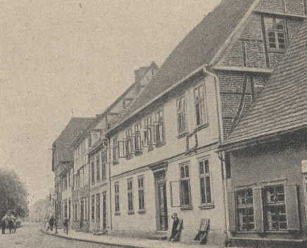 Helmuth Moltkes Geburtshaus in Parchim